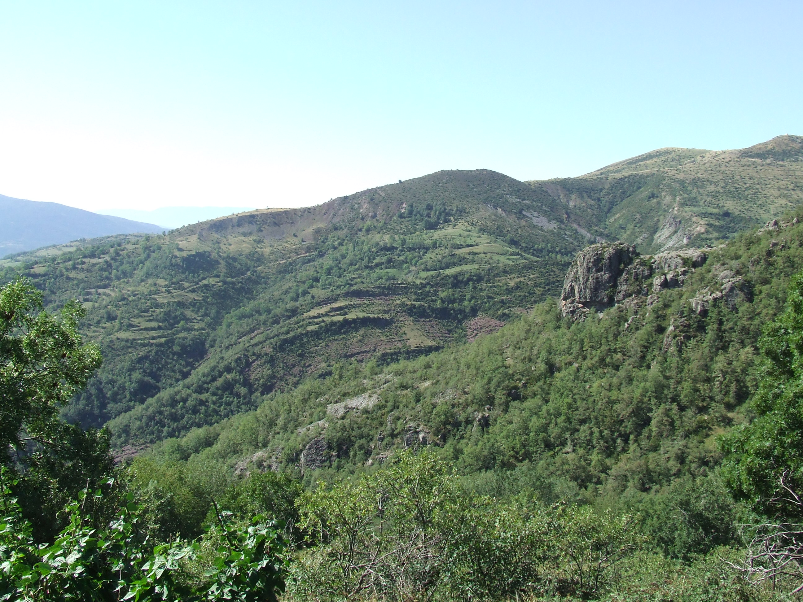 El Serrat de l'Aire (la Torre de Cabdella, Pallars Jussà)